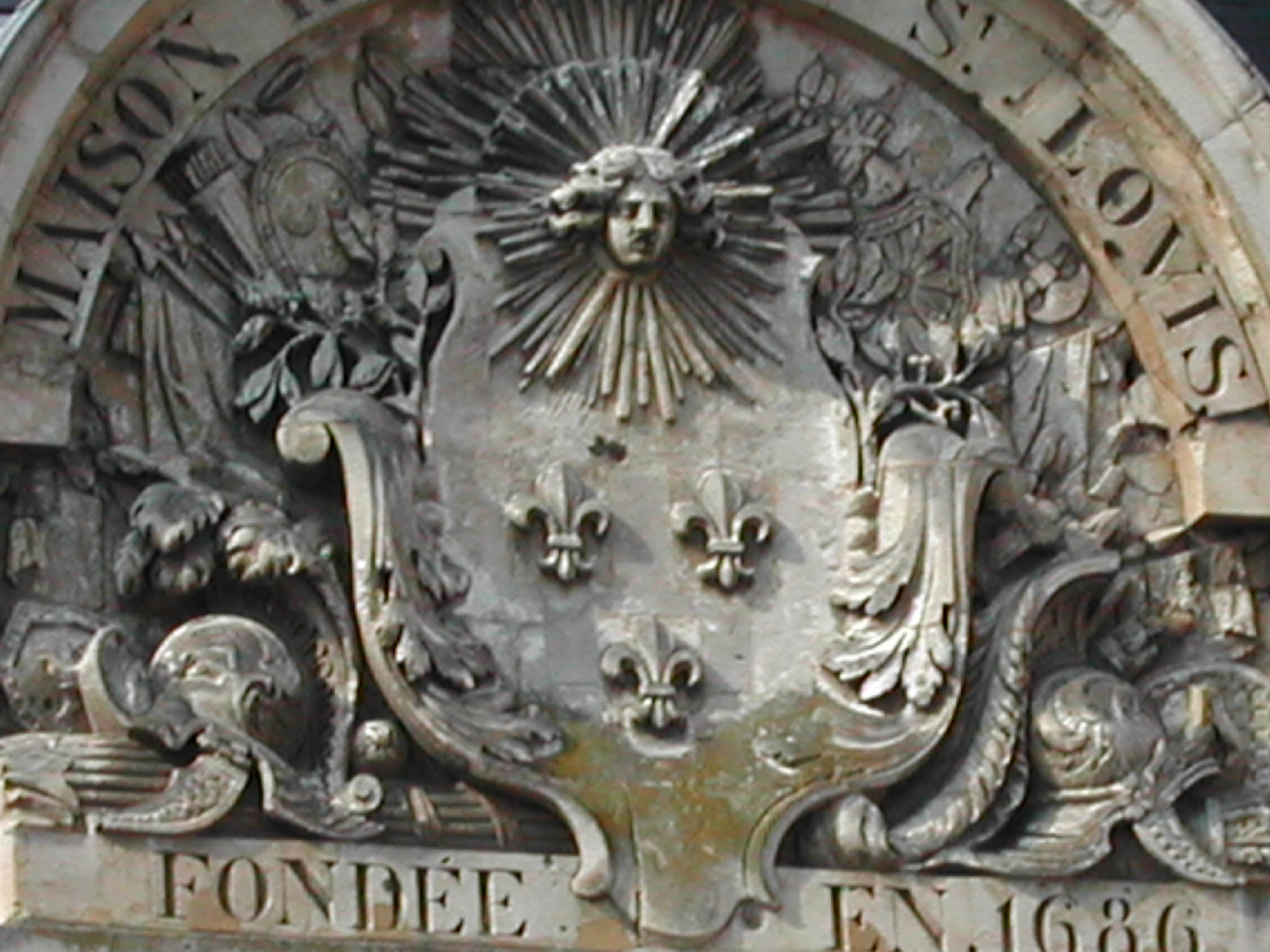 Fronton de la façade principale du Lycée Miltiaire de Saint Cyr Auteur: Ledoux Olivier - user:Olivier10546 Site : Licensing Catégorie:Image de Saint-Cyr-l'École